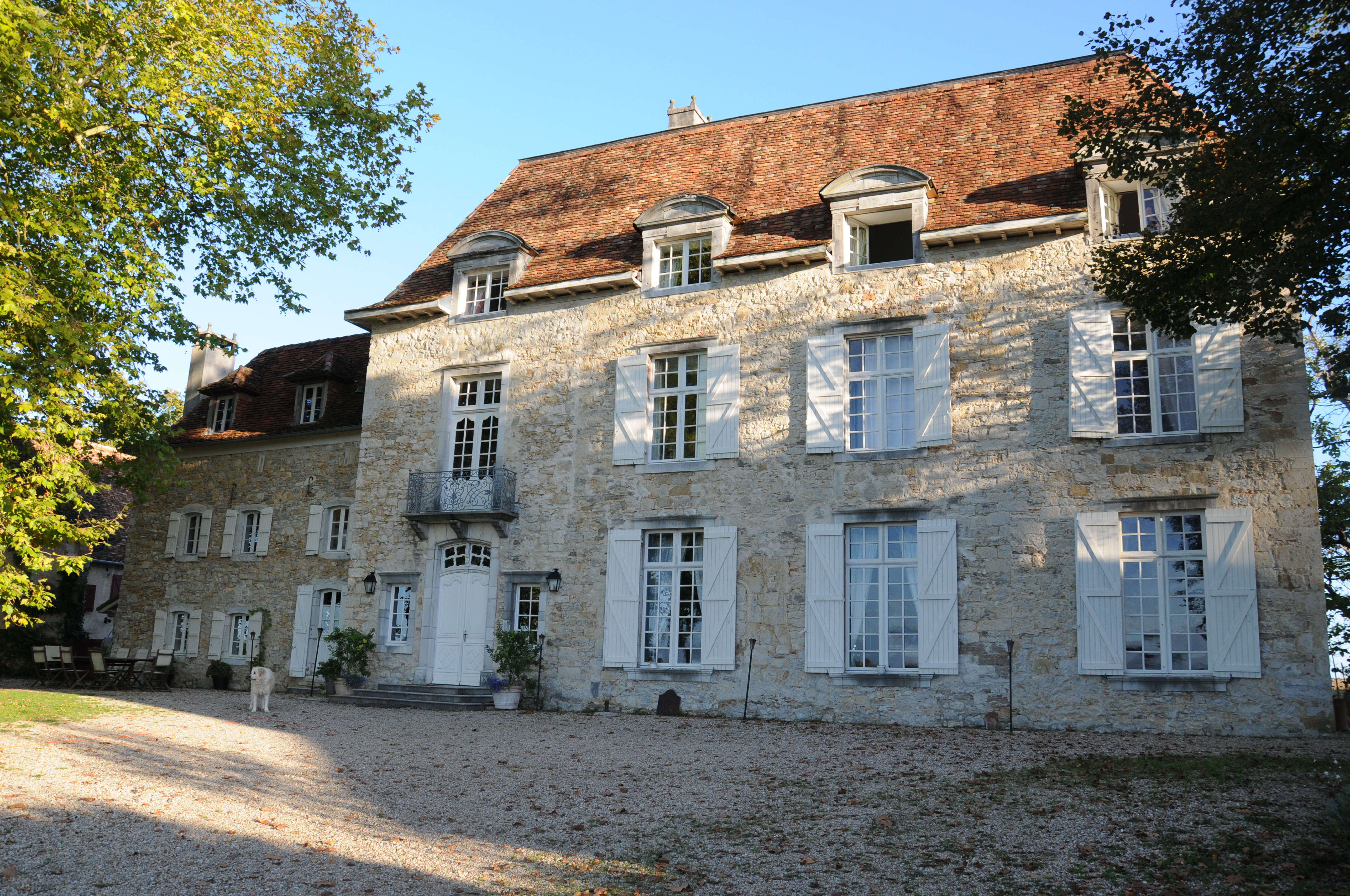 Frontansicht Château d´Orion